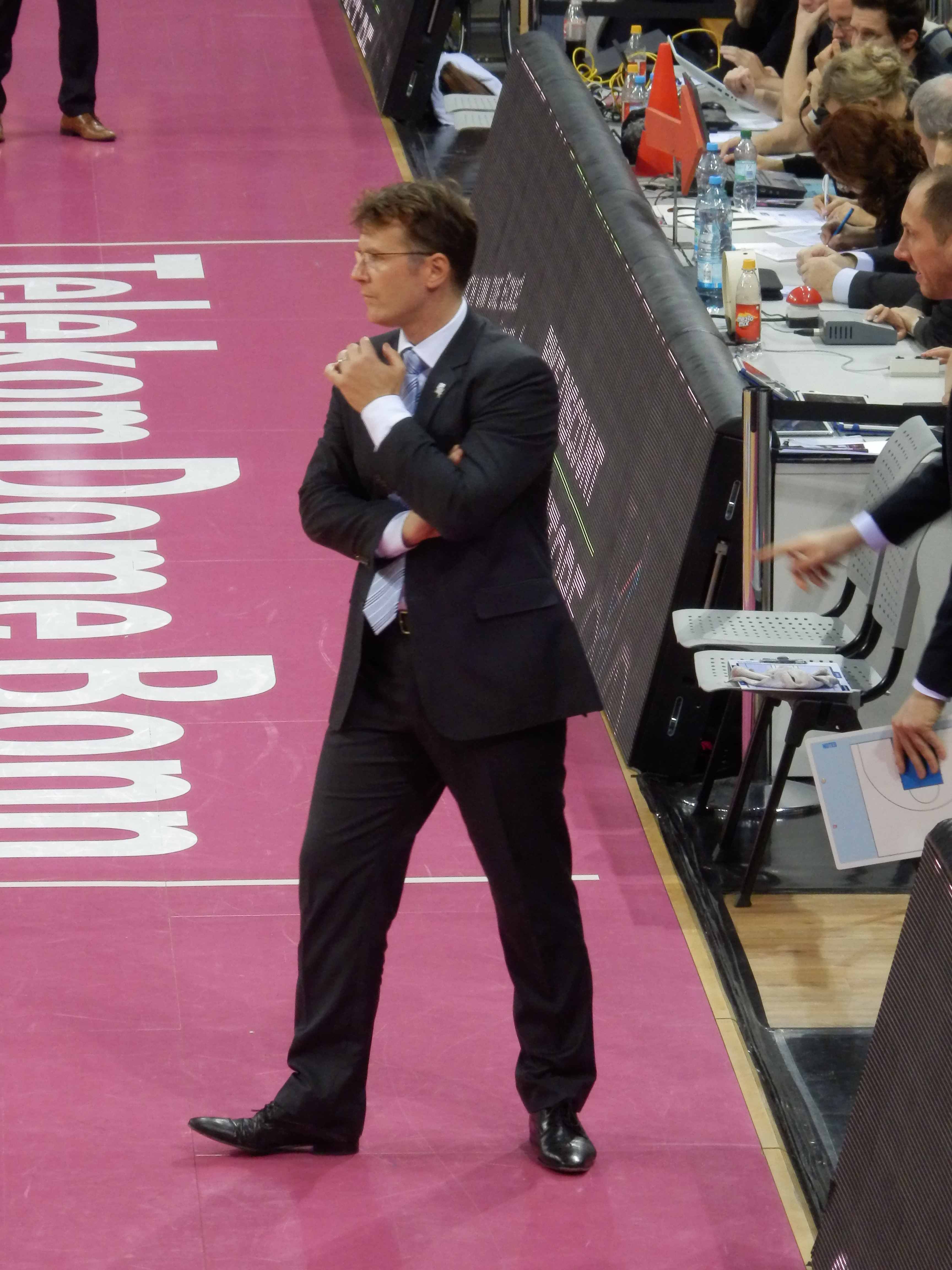 Mathias Fischer beim Spiel der Telekom Baskets Bonn gegen den MBC am 7. Oktober 2015.